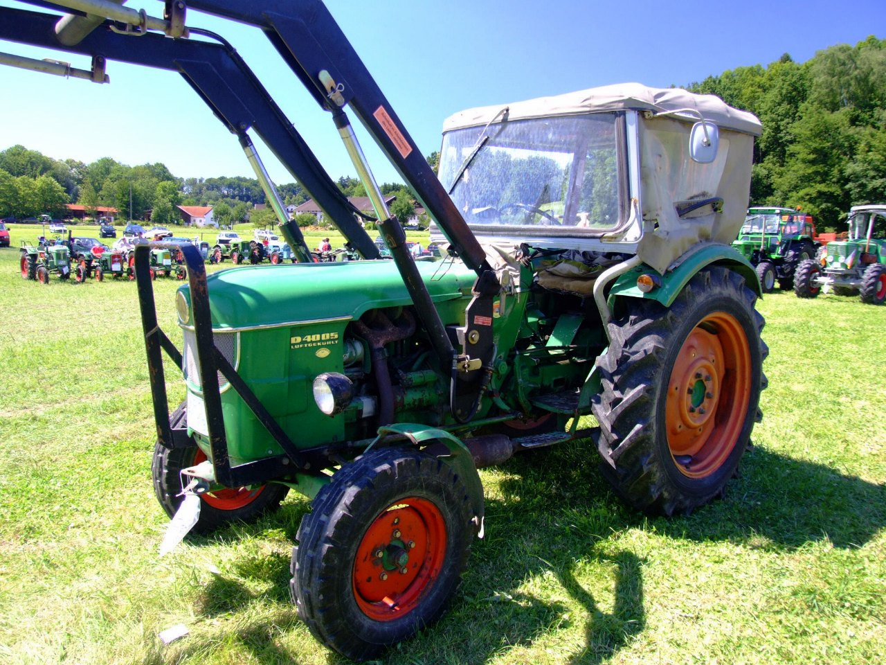 Deutz D4005 (35 PS, Baujahr 1965) mit Frontlader und Verdeck